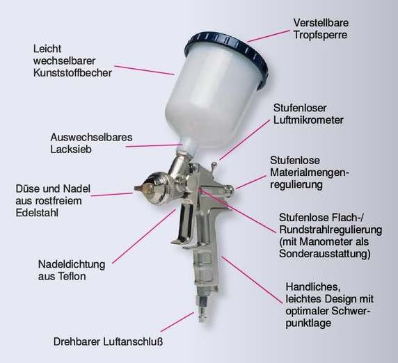 Spritzpistole OPTIMA 900